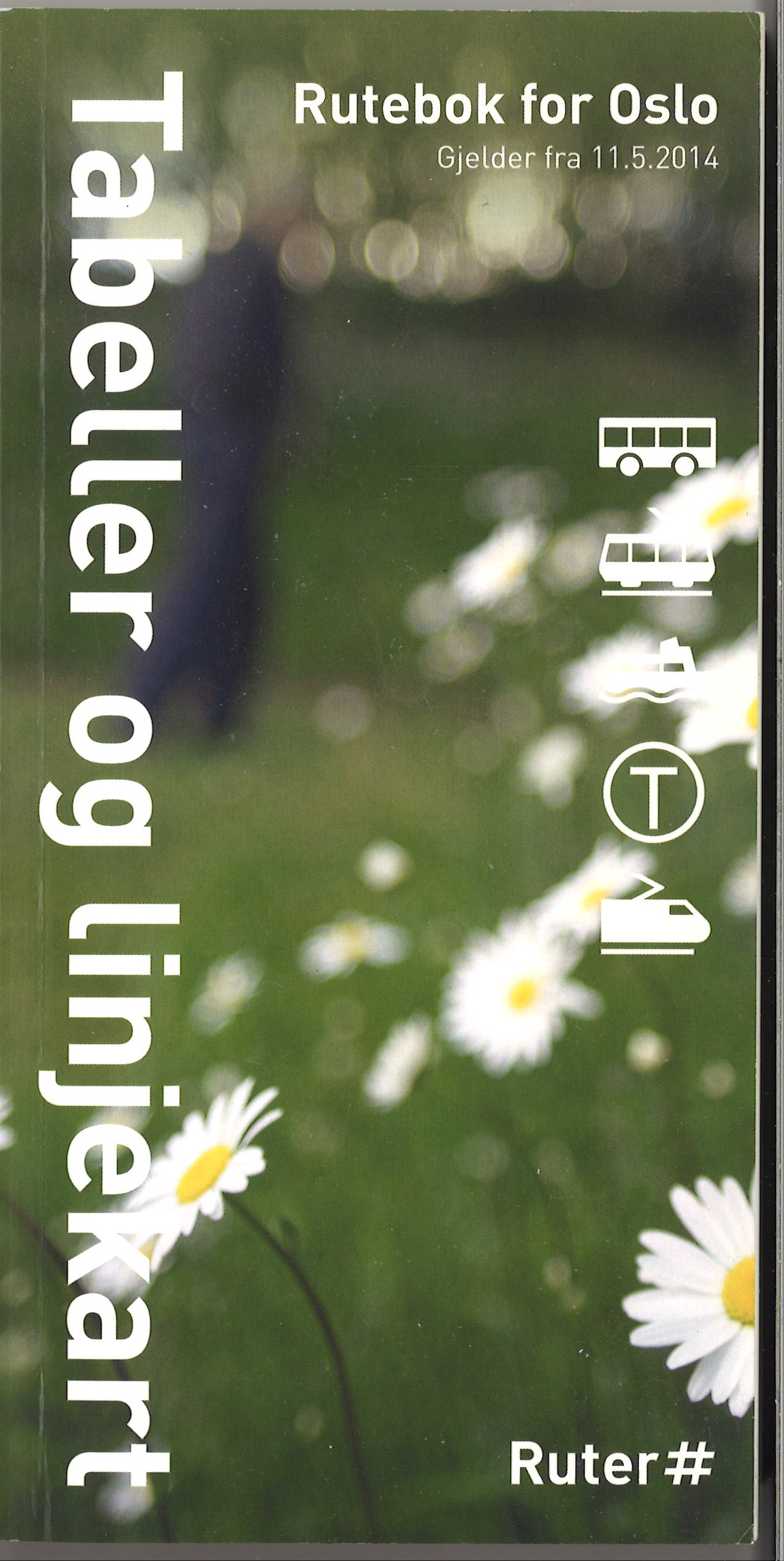 Rutebok for Oslo for 2014. Framside.